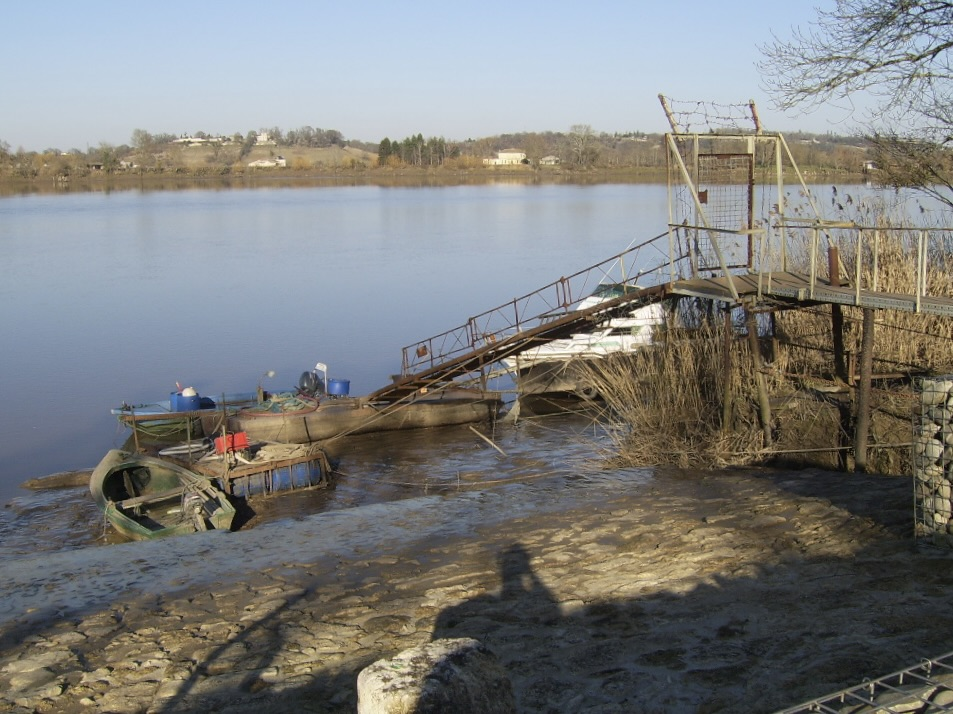 Photo du Fleuve vers la commune de Vayres